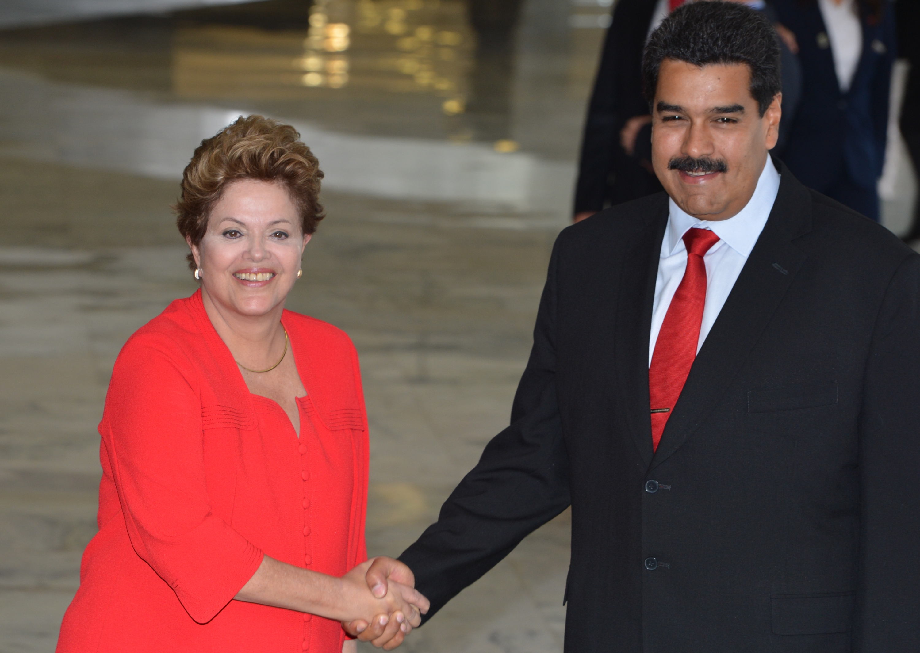 A presidenta Dilma Rousseff recebe o presidente da Venezuela, Nicolás Maduro, no Palácio do Planalto